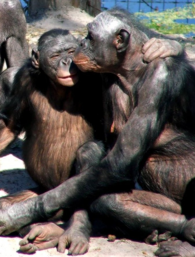 Bonobo love